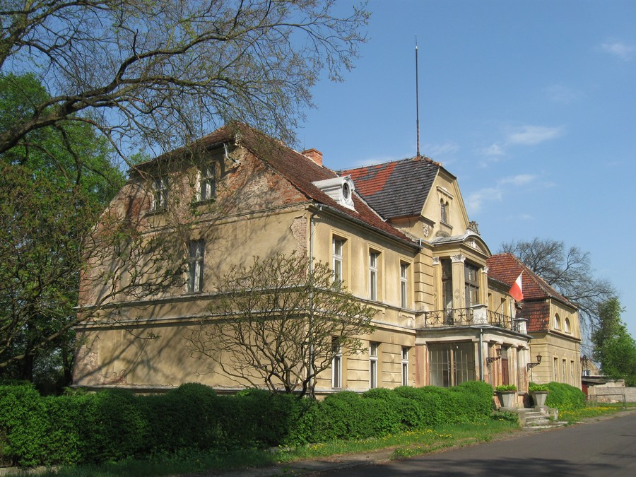 Stare Strącze - dwór